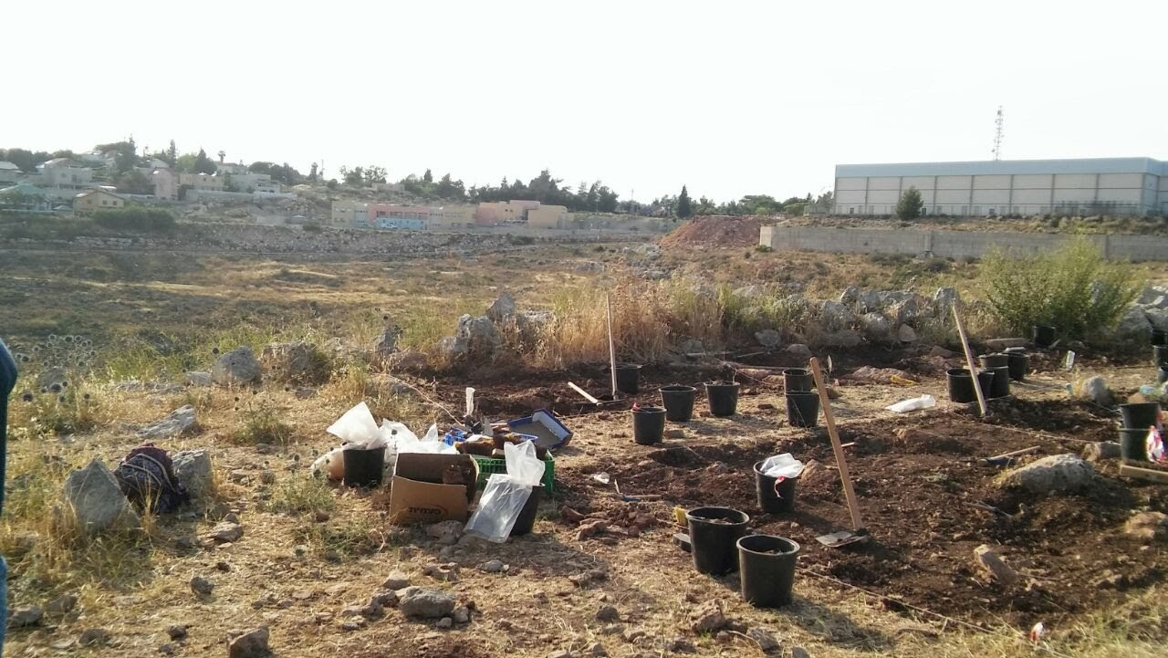 כלי חפירה ארכאולוגית על רקע אתר החפירות גתות ברקן